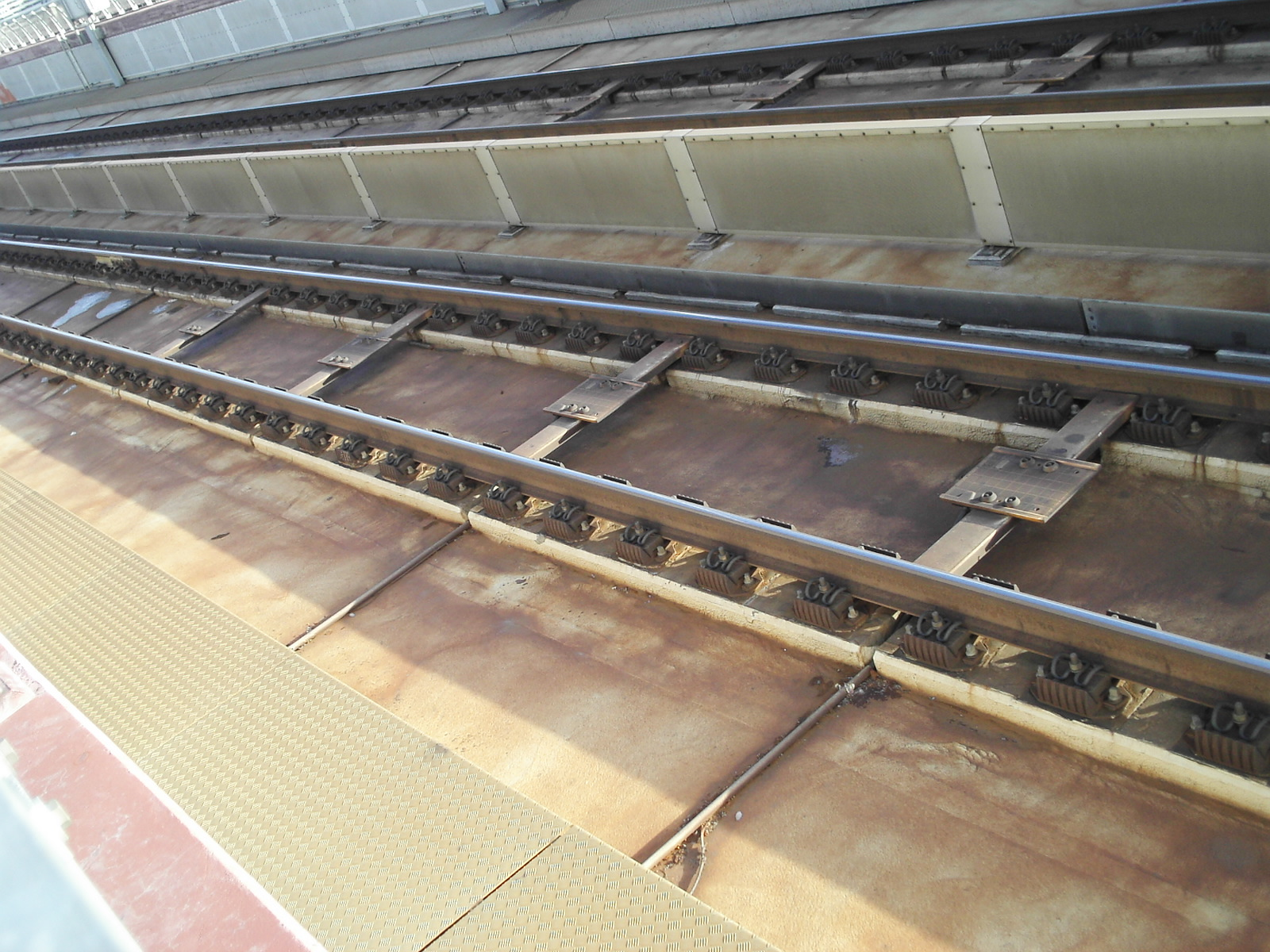 Balises